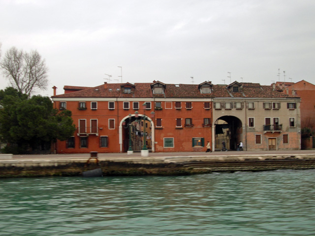 Case della Marinarezza a Venezia